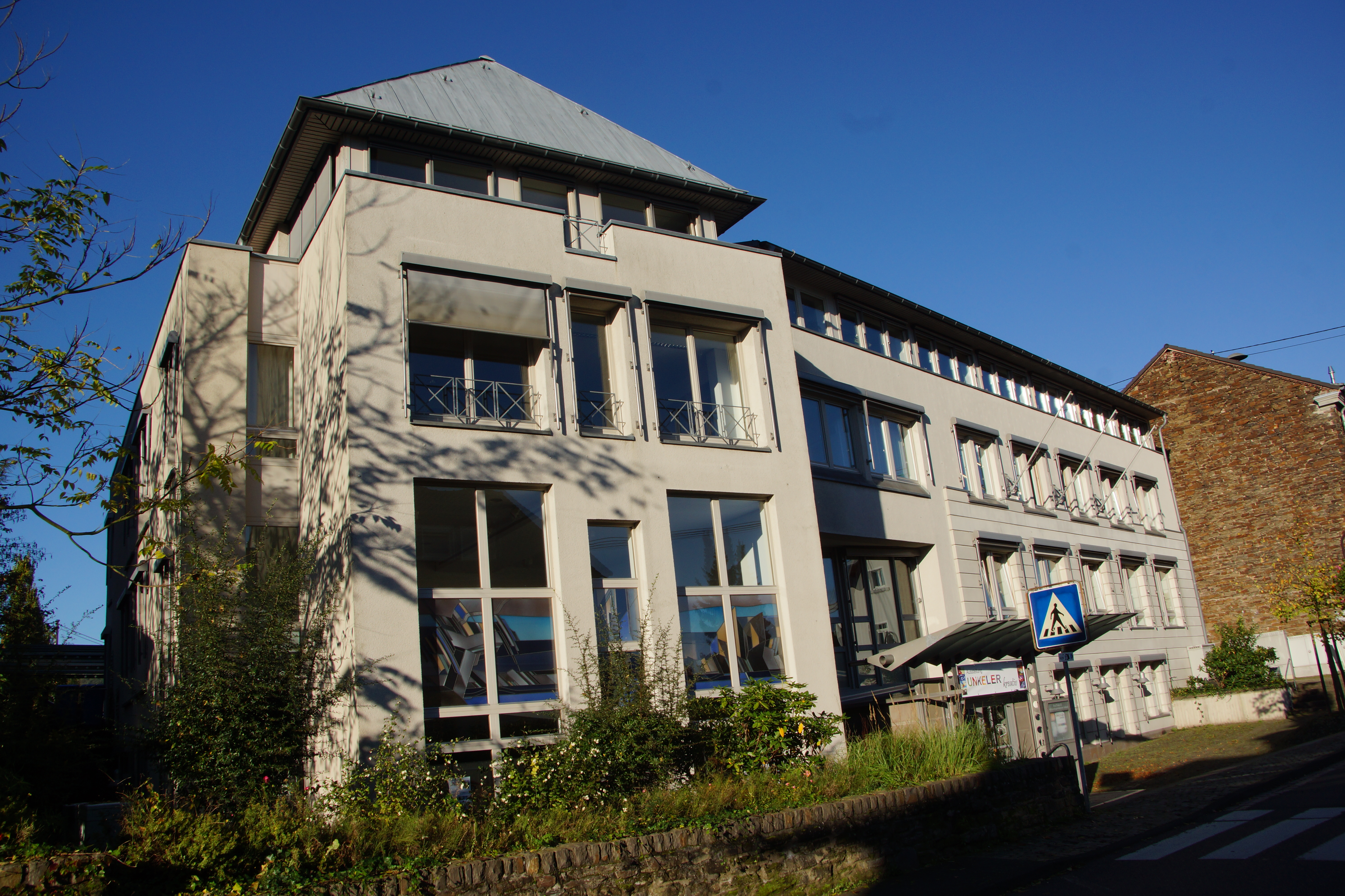 Rathaus der Verbandsgemeinde Unkel